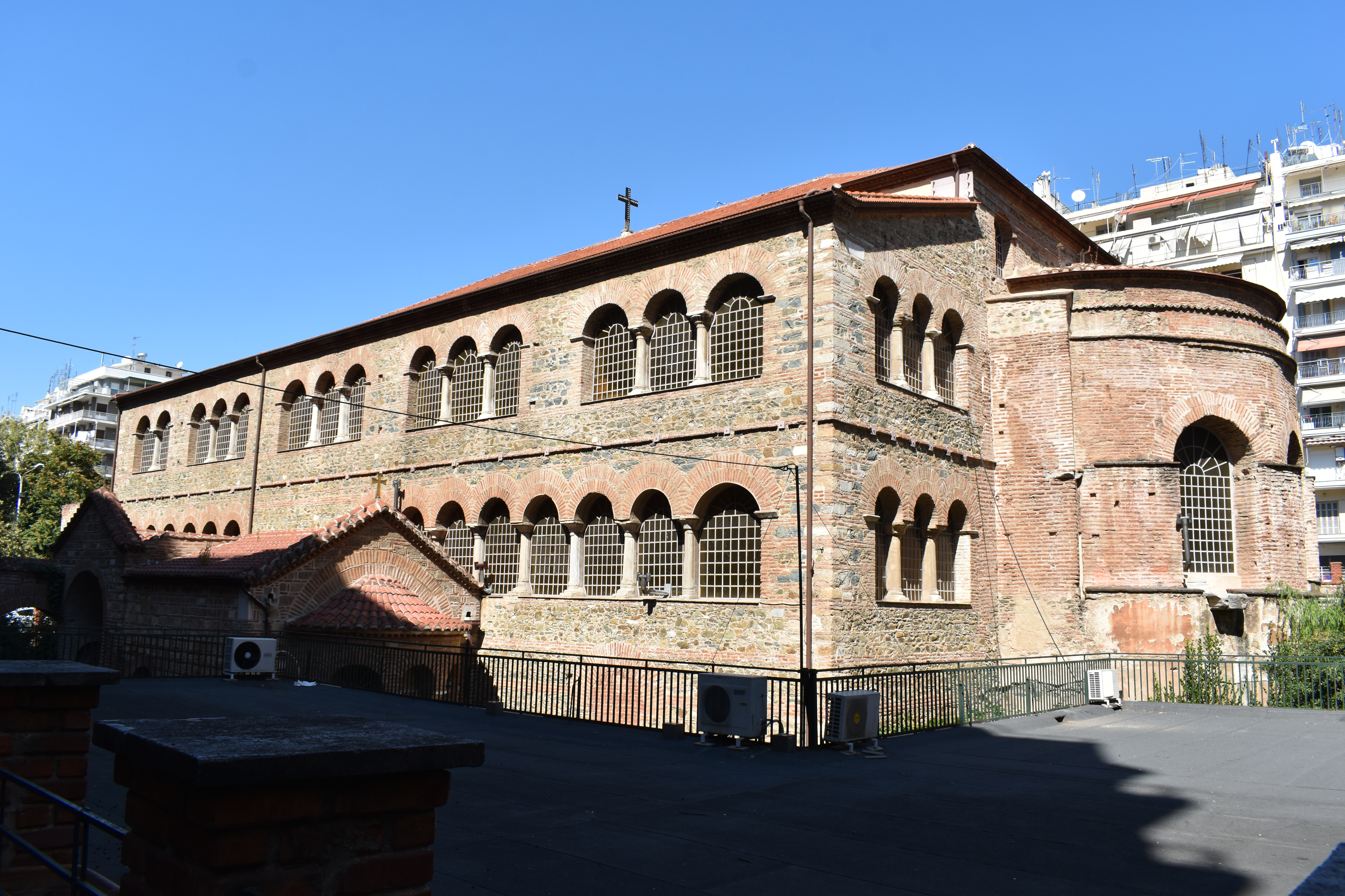 Αχειροποίητος«Αχειροποίητος»